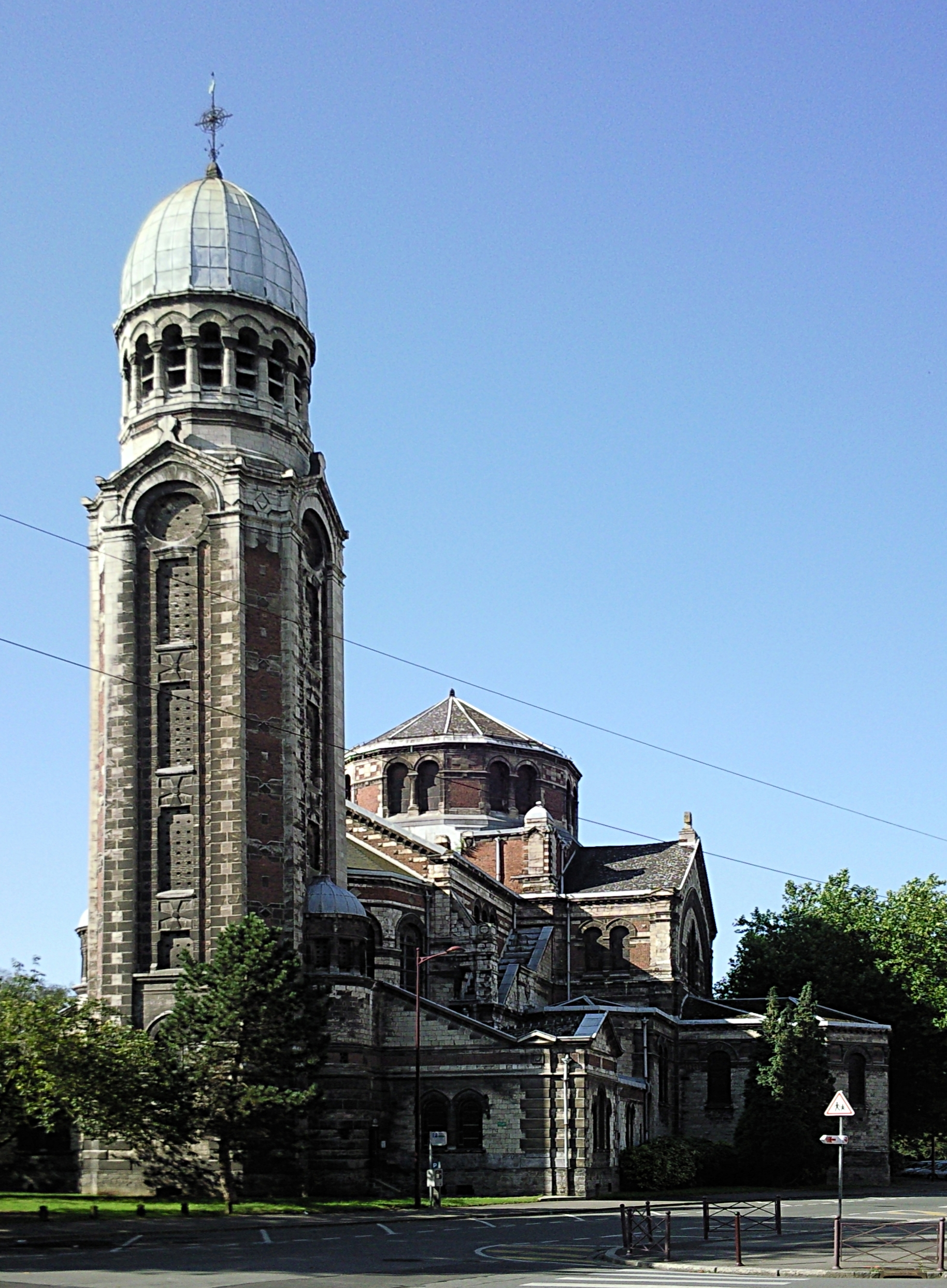 L'église Saint-Sauveur dans le centre de Lille (Nord). De style éclectique et néo-byzantin, elle est construite par l'architecte François-Joseph Delemer entre 1896 et 1902.